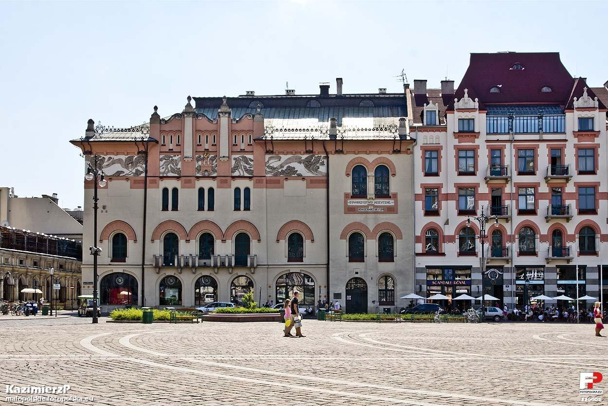 Południowa pierzeja placu Szczepańskiego z Teatrem Starym.